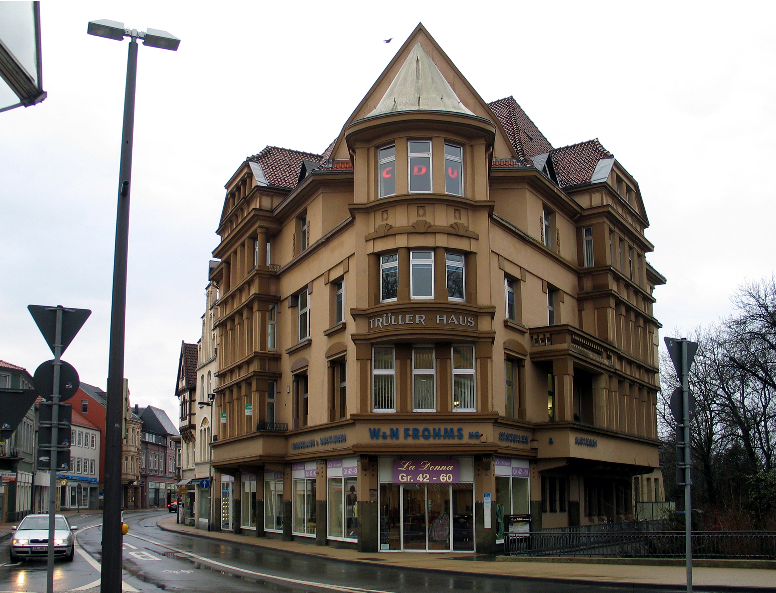 Das Trüller-Haus unter der heutigen Adresse Westcellertorstraße 15a in Celle ließ sich der Celler Zwieback- und Keksfabrikant Harry Trüller 1908 als repräsentatives Wohn- und Geschäftshaus von dem Architekten Otto Haesler errichten ...